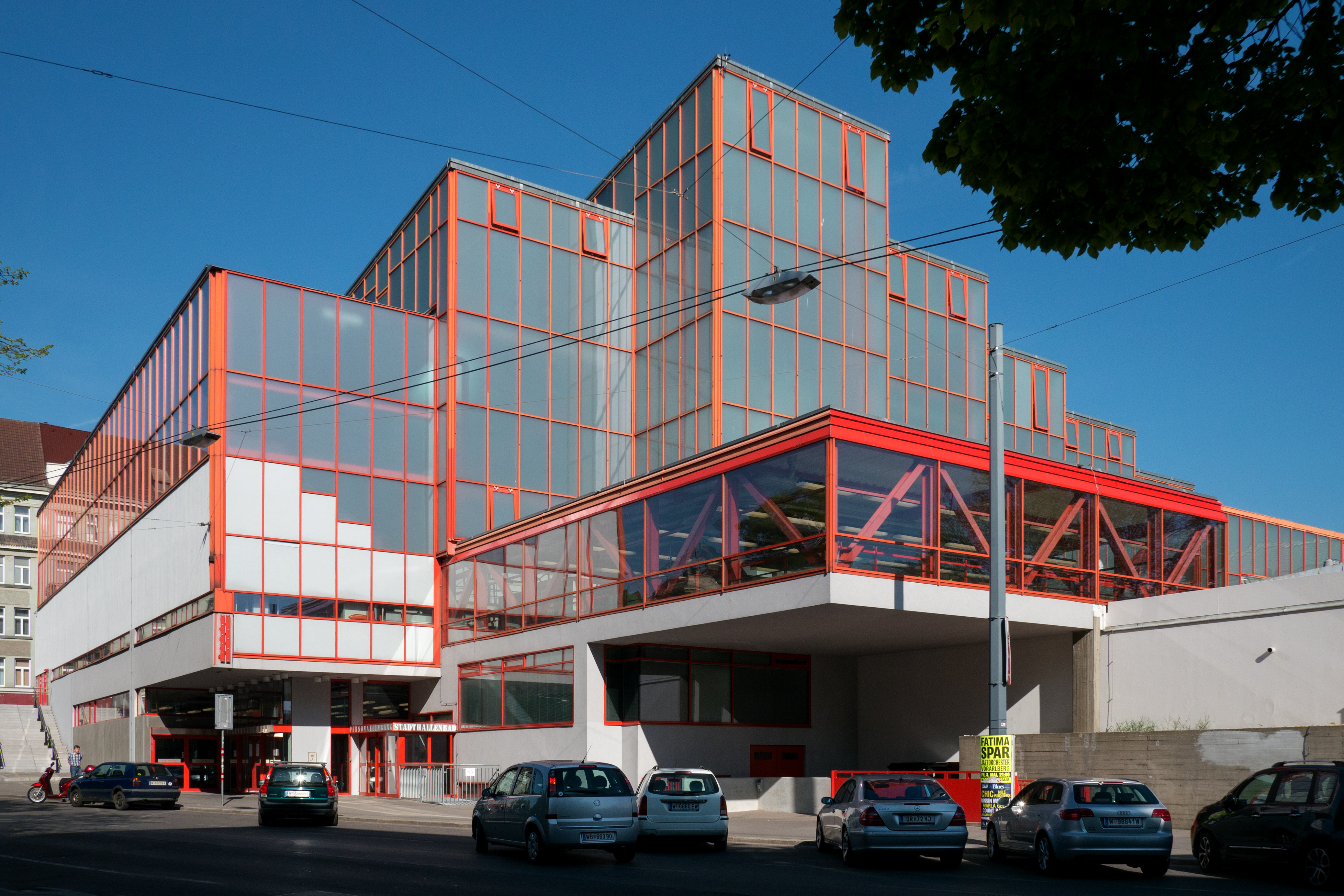 Stadthallenbad